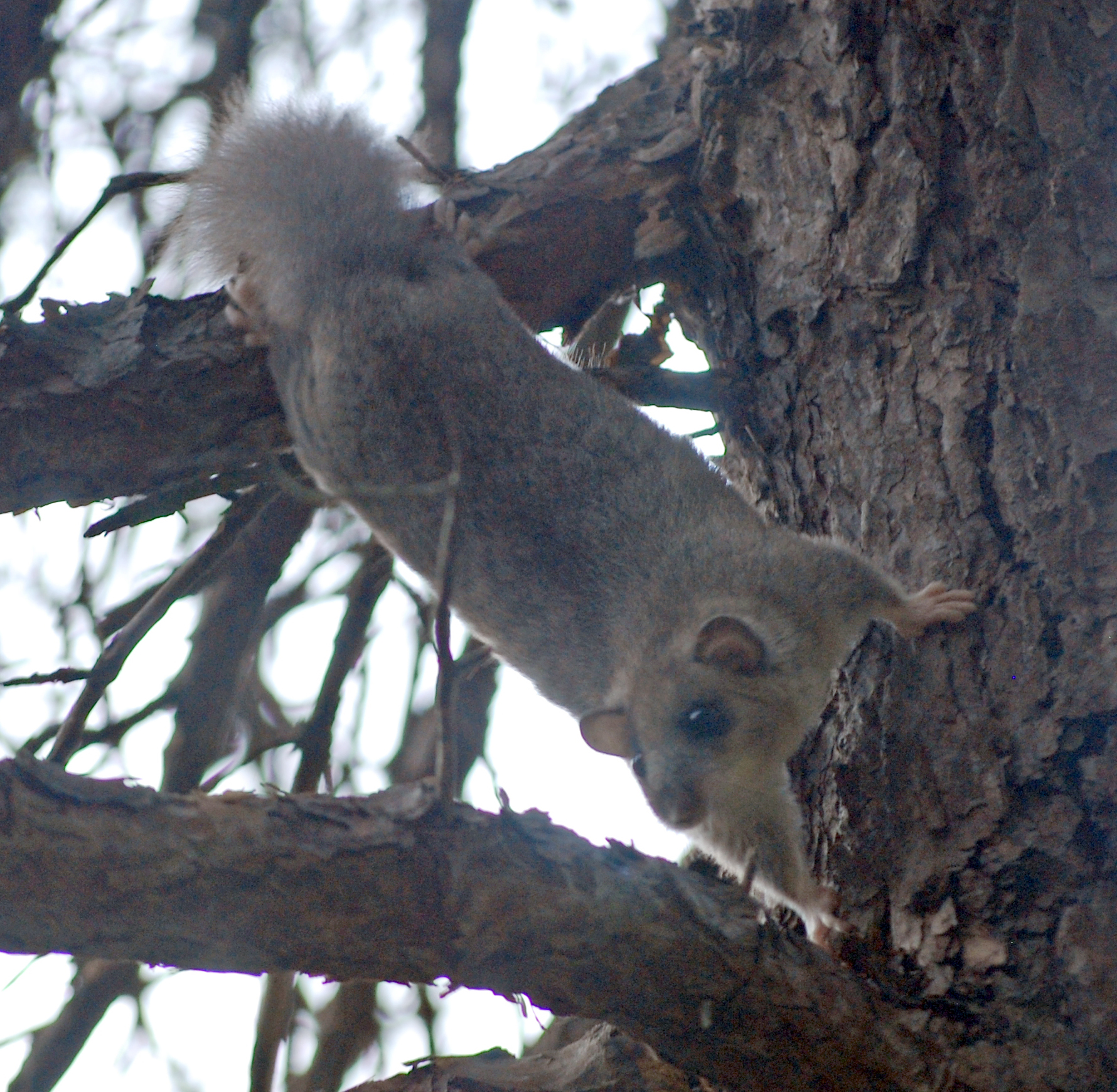 Siebenschläfer kletternd